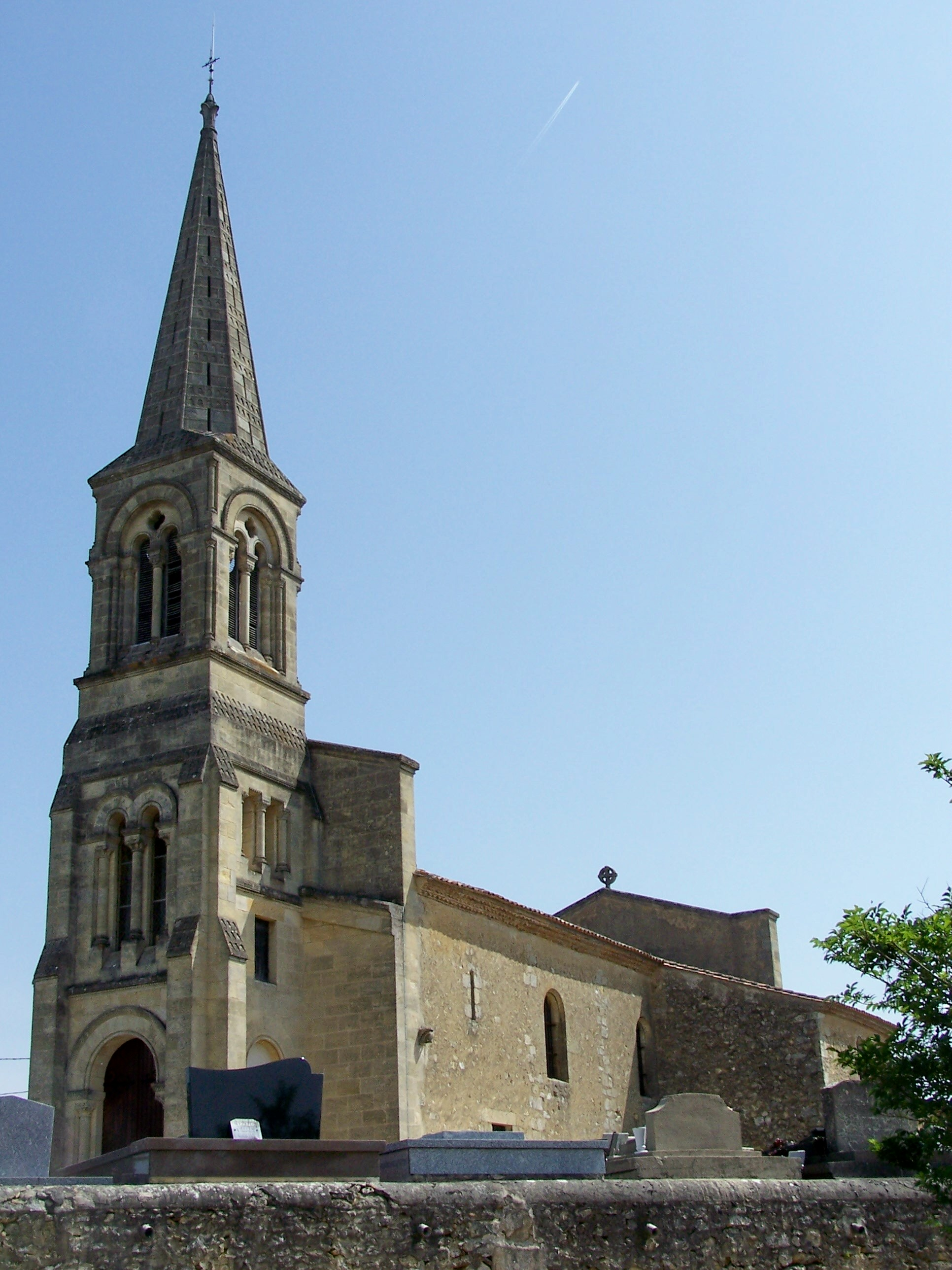 Église de Monprimblanc, Gironde, France